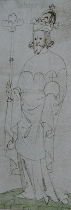 Jindřich VII